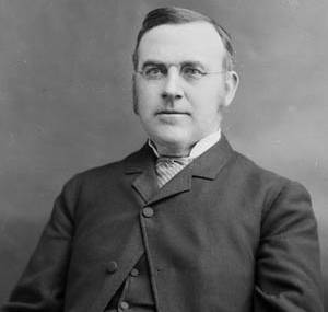 Fleming, James M.P. (Peel) June 20, 1839 - 1902.